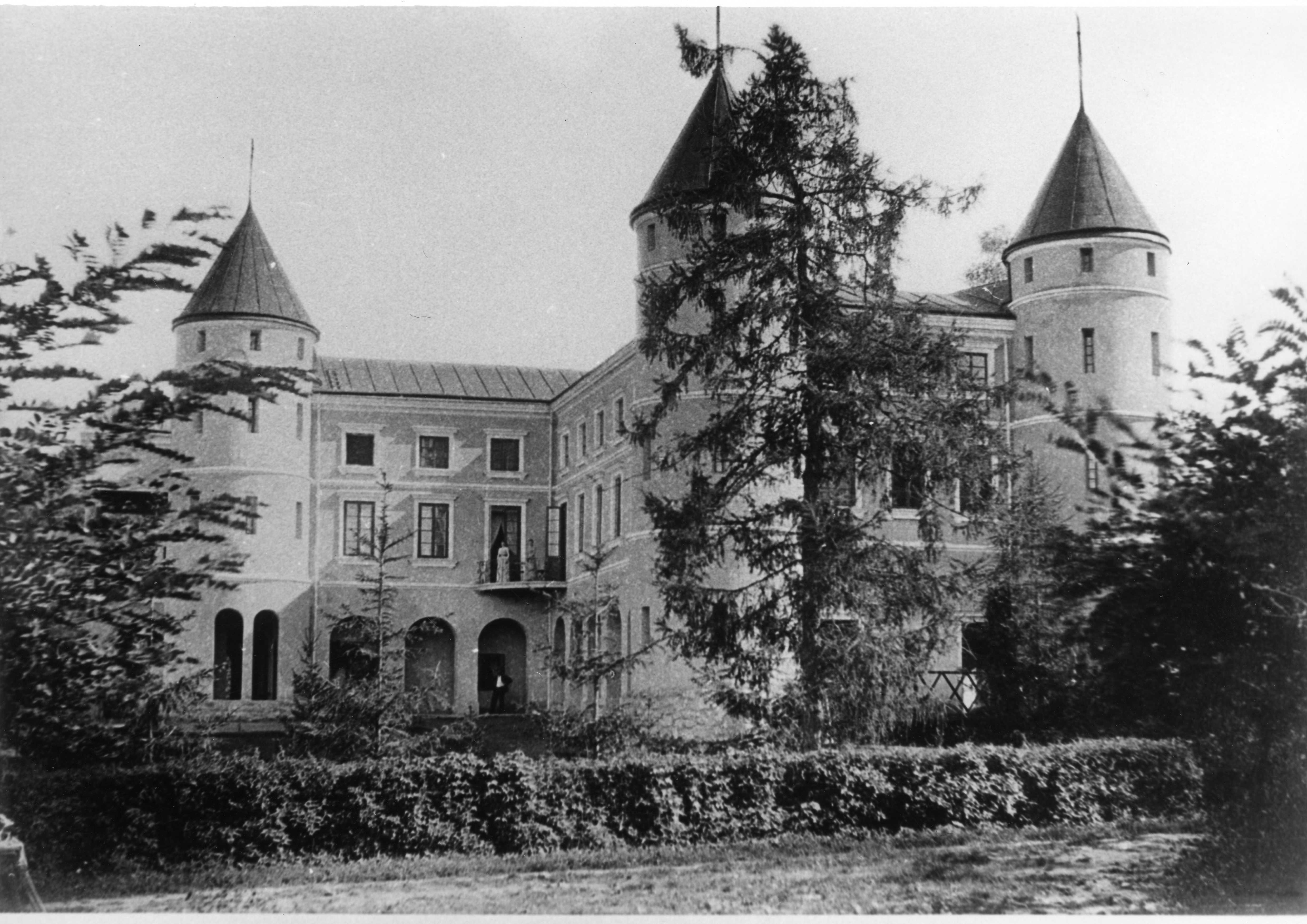 Wzdow Palace in Poland